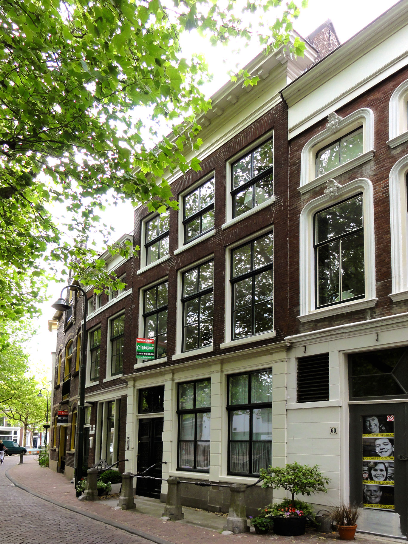 Lage Gouwe 70 Gouda, rijksmonument